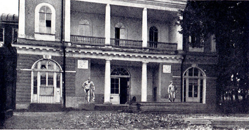 Фотография Строгановской дачи из книги Г. К. Лукомского ”Старый Петербург. Прогулки по старинным кварталам столицы”, 1908